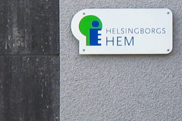 Helsingborgshems logo